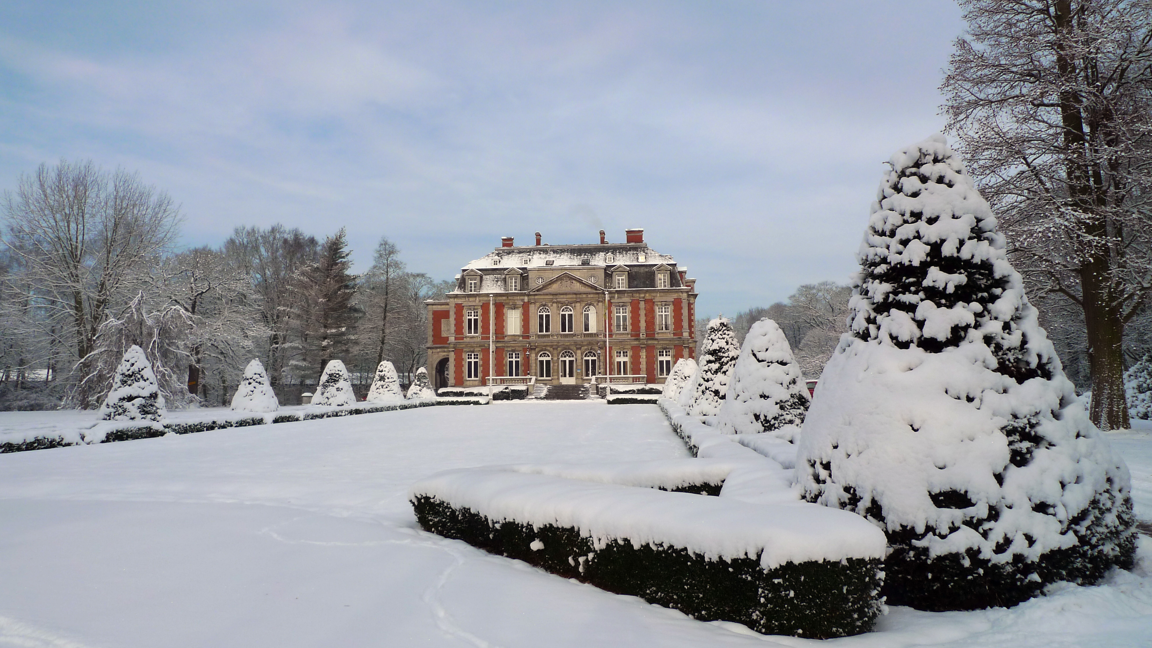 "De Horst", modo "Hof Ter Veken", gelegen in beboomd en omgracht domein afgezet met rododendrons. Neoclassicistisch kasteel van 1896-1905 waarvoor keurige Franse tuin; aan O.zijde het voormalige XVIII-woonhuis, in 1832 omgebouwd tot remise, nu vormingscentrum voor speelpleinmonitoren.